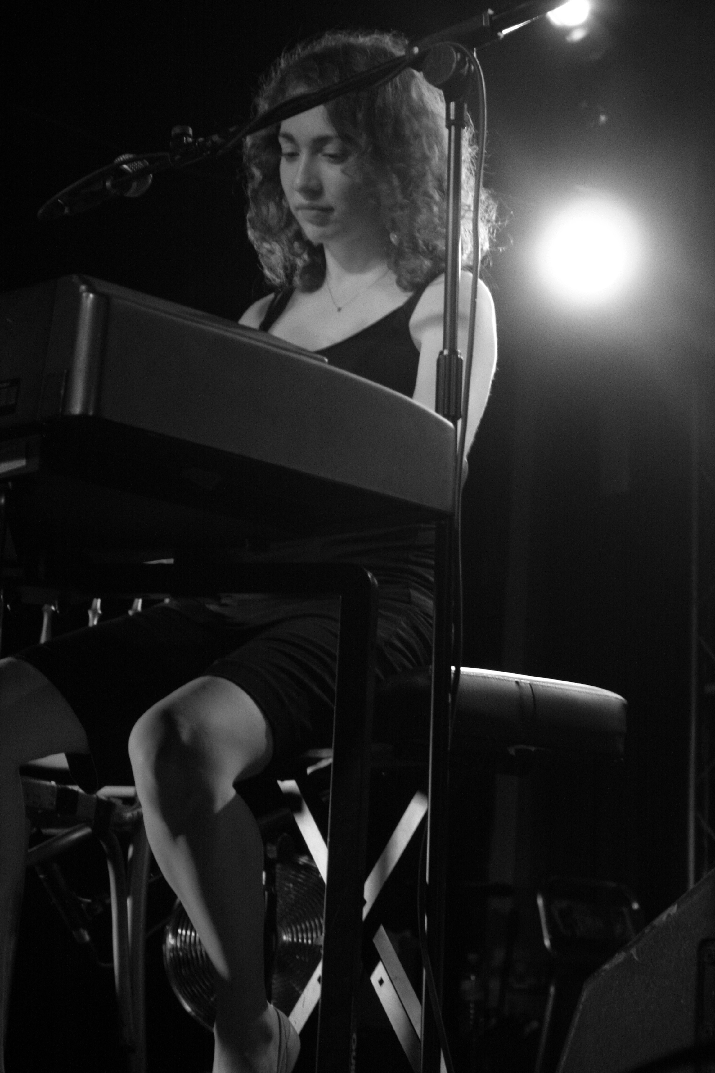 Regina Spektor in concert.regina spektor